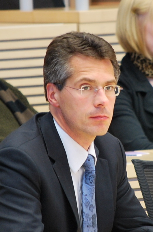 Prof. Dr. Utz Schliesky